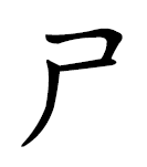 щи чжуинь